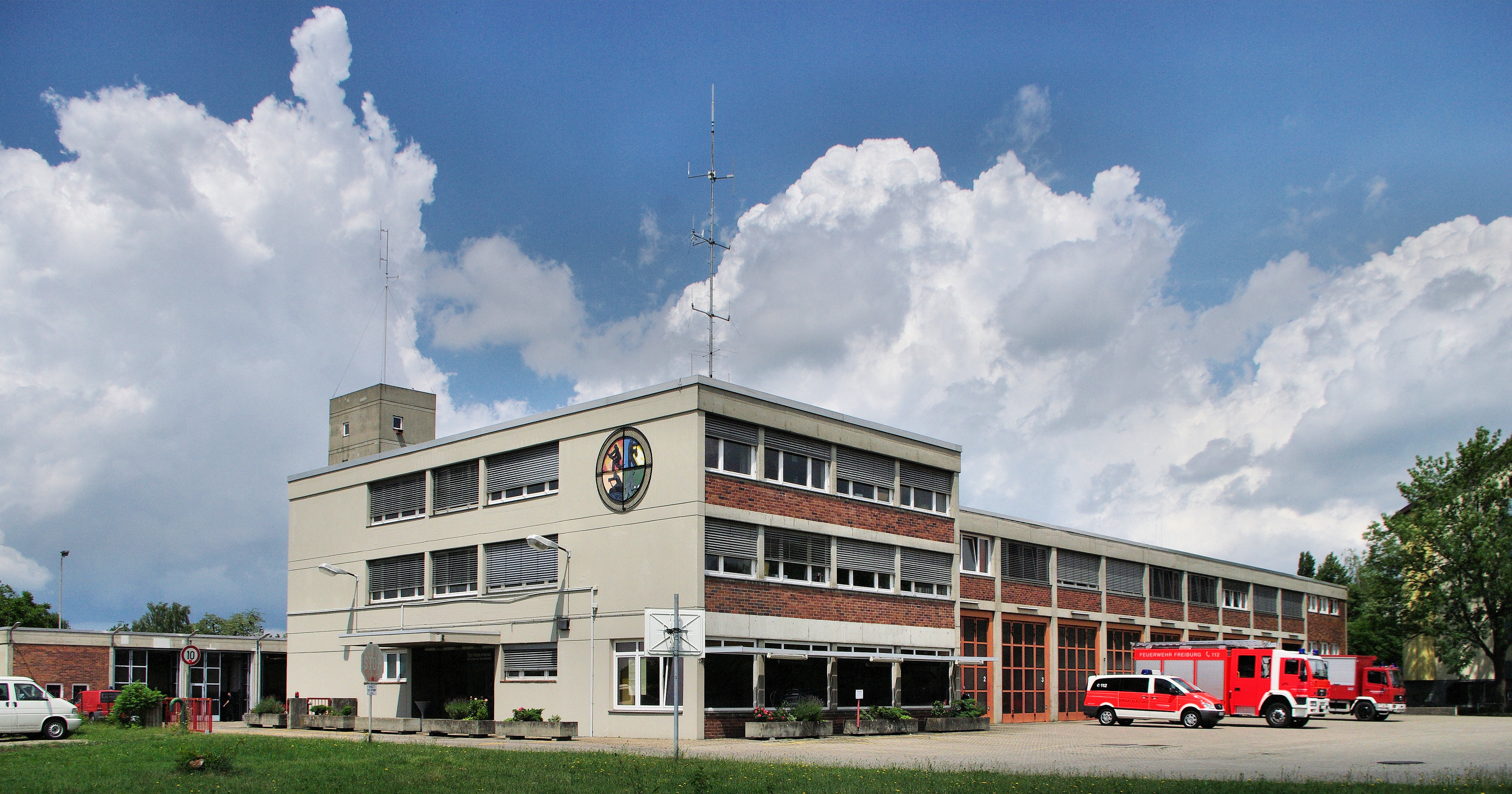 Hauptwache der BF Freiburg Das Hauptgebäude von vorn